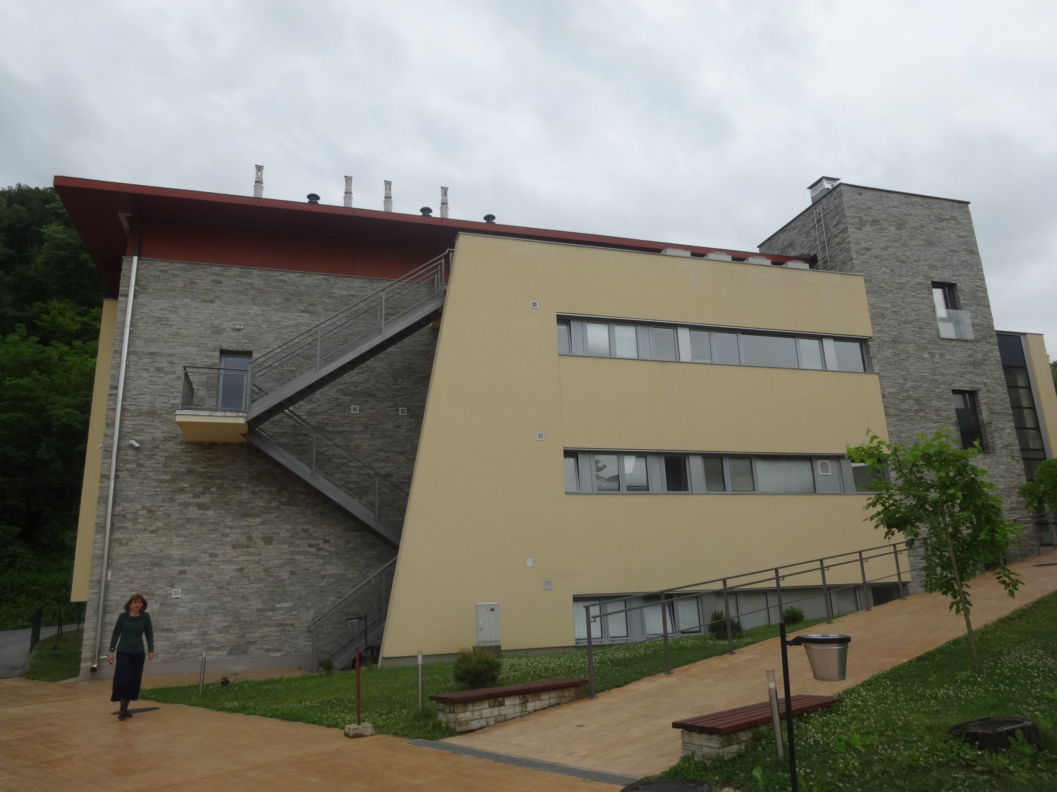 Istraživačka stanica Petnica - zgrada laboratorije.